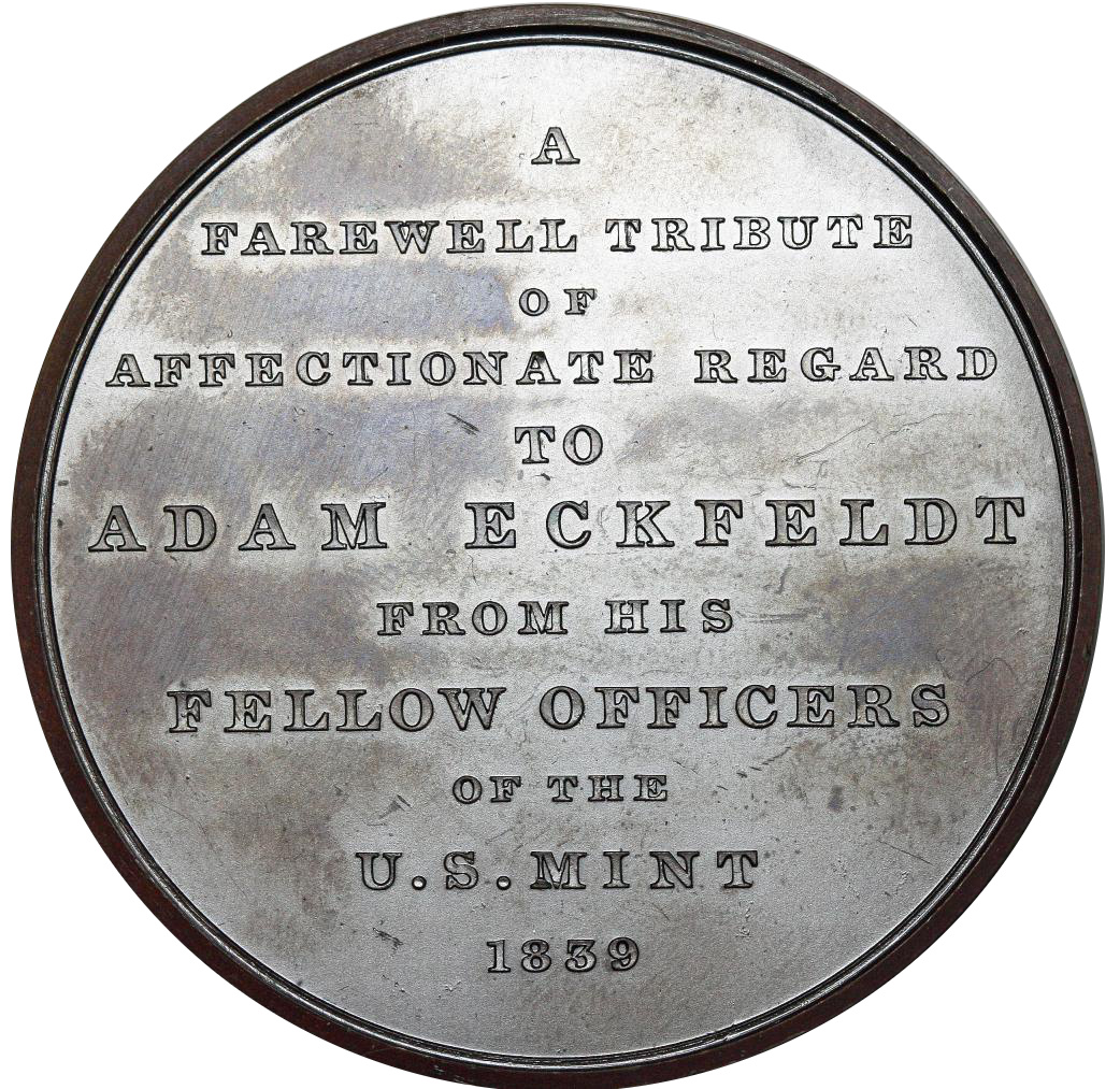 Retirement medal for Adam Eckfeldt, 1839